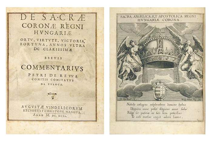 Horányi Elek (Nepomuki János Ferencz József) (Buda, 1736. február 15. – Pest, 1809. szeptember 11.) piarista szerzetes műve: De sacra corona Hungariae ac regibus eadem redimitis commentarius. Pestini 1790.